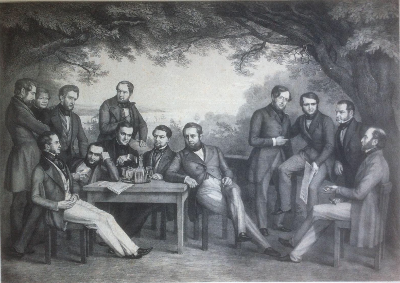 Mitglieder des Heidelberger Clubs auf der Elbterrasse des Jacob in Nienstedten. Lithographie von Otto Speckter (1847). Abgebildet von links nach rechts: Alfred Schädtler (Journalist, Corps Hanseatia Göttingen und Corps Hanseatia Heidelberg), Joachim Hübener (Arzt, Corps Hanseatia Heidelberg), Ernst Goßler (Präses des Niedergerichts), Gustav Niebuhr (Arzt, Corps Hanseatia Heidelberg), Robert Herzfeld (Arzt, Corps Hanseatia Heidelberg; Stifter des Clubs), Julius Dalmer (Kaffeemakler, Corps Hanseatia Heidelberg und Corps Vandalia Rostock), Gerhard von Hoßtrup (Herausgeber der Börsenhalle, Corps Hanseatia Heidelberg), Diedrich Eckmeyer (Prokurator, Corps Hanseatia Heidelberg; Stifter des Clubs), Hermann Gernet (Physikus, Corps Hanseatia Heidelberg; Stifter des Clubs), Senatssyndikus Carl Hermann Merck, BM Carl Petersen (Corps Hansea Göttingen, Corps Saxo-Borussia Heidelberg und Stifter des Corps Hanseatia Heidelberg), Julius des Arts (Advokat, Corps Borussia Göttingen), BM Gustav H. Kirchenpauer